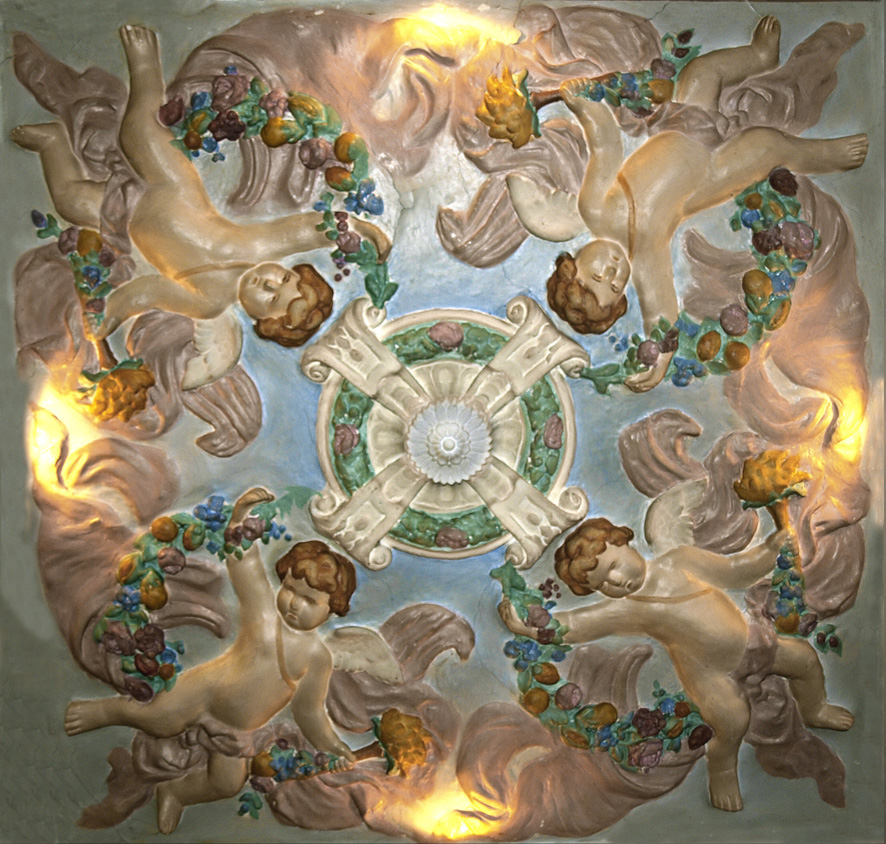 Фрагмент декора перестроиного костела у Луганске (нач..ХХ в.)